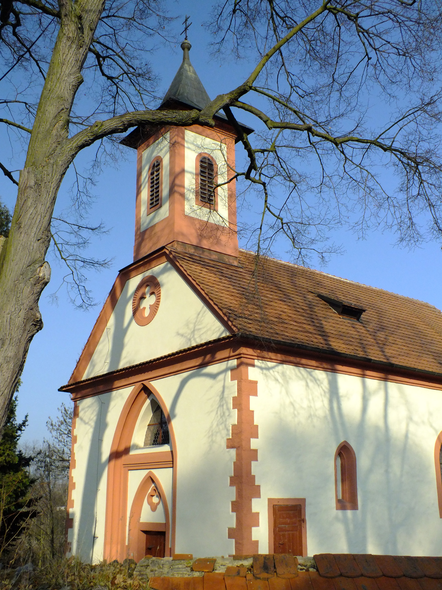 Kostel sv. Mikuláše (Zdemyslice), Zdemyslice